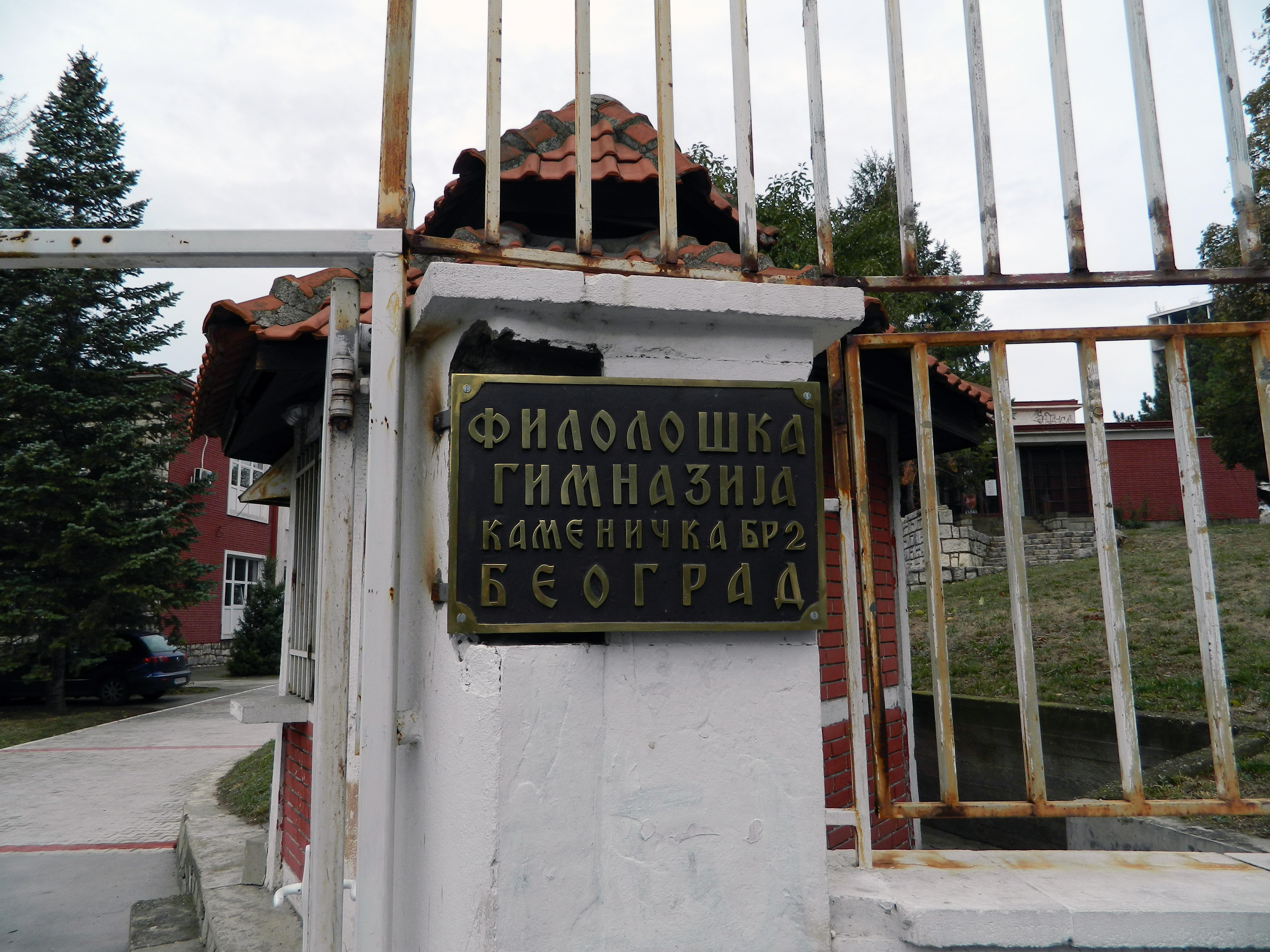 Filološka gimnazija u Beogradu.